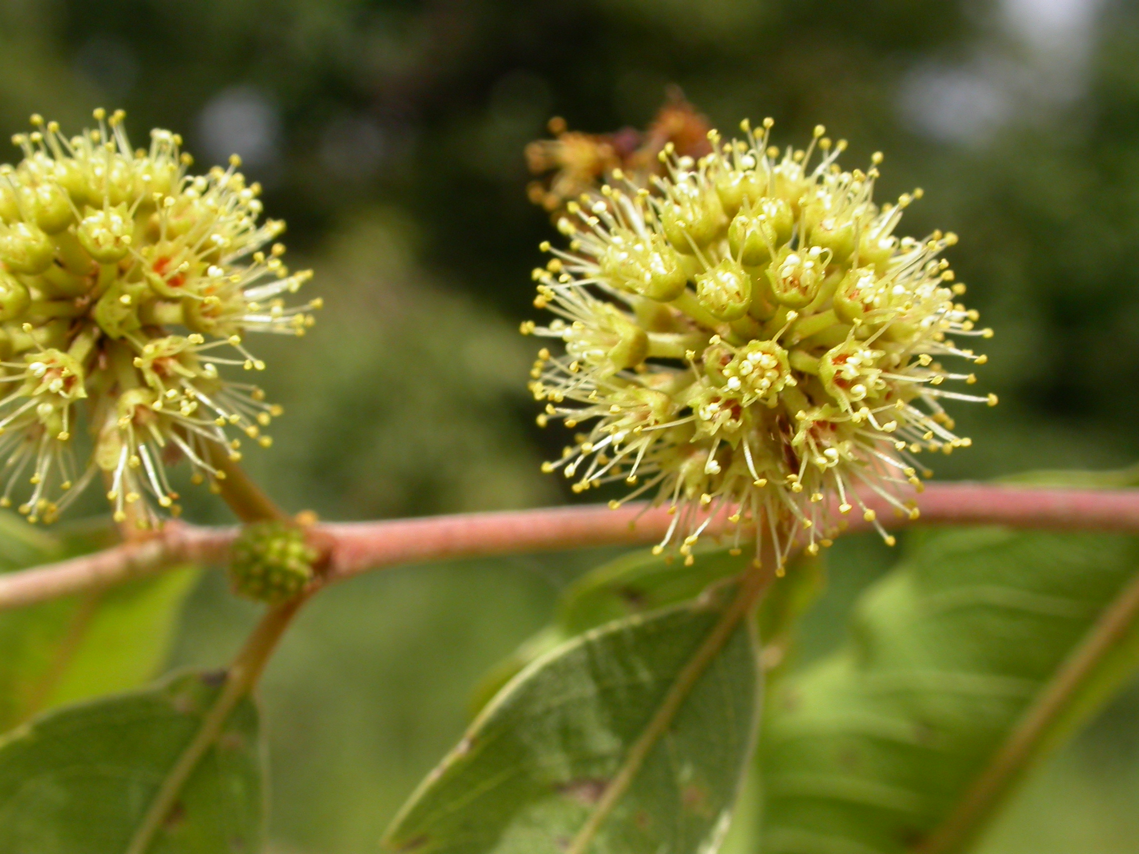 Anogeissus leiocarpa, Burkina Faso